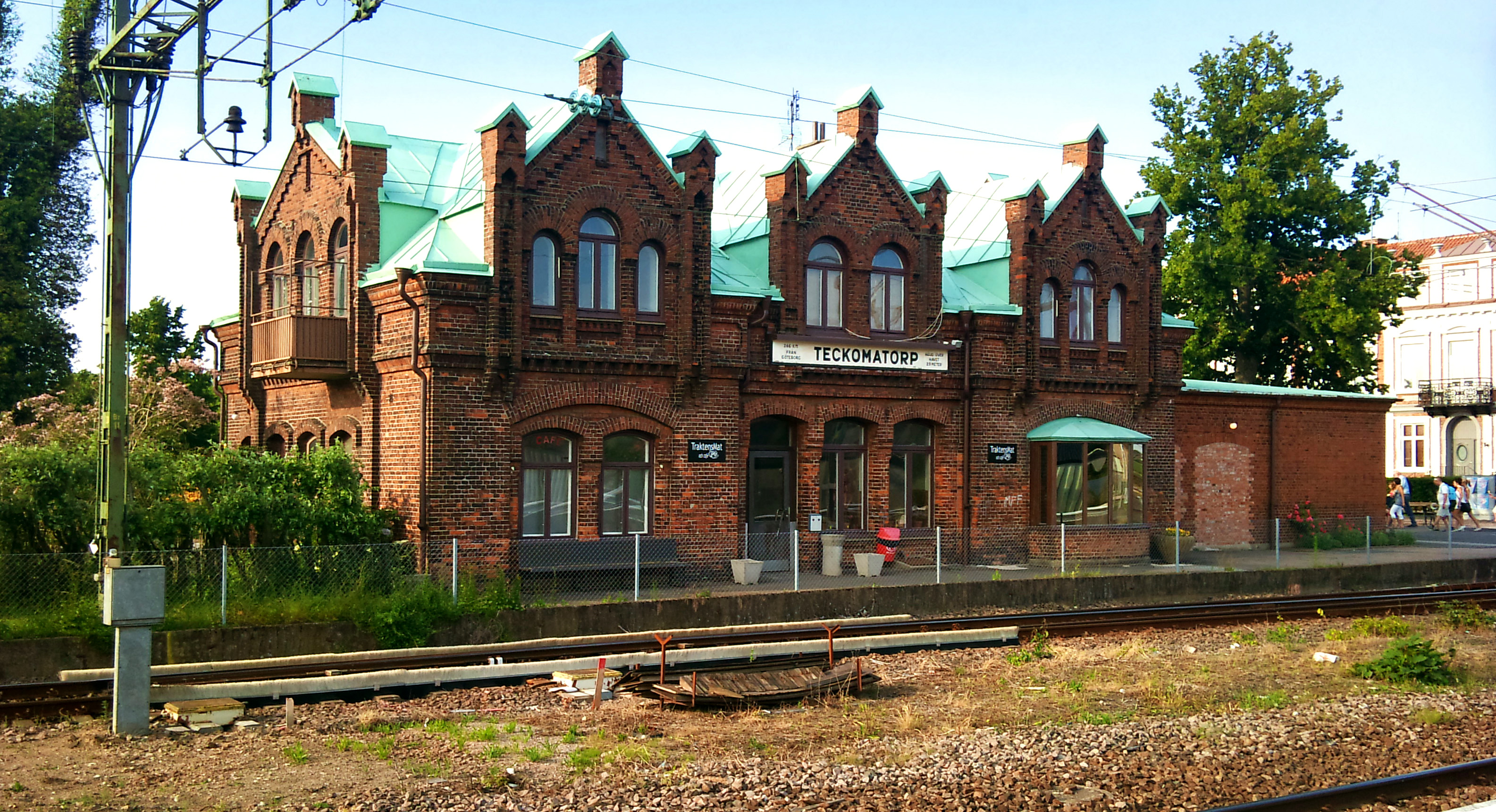 Teckomatorps stationshus, numera kafé